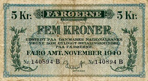 Føroyskt: Fimm krónur, november 1940